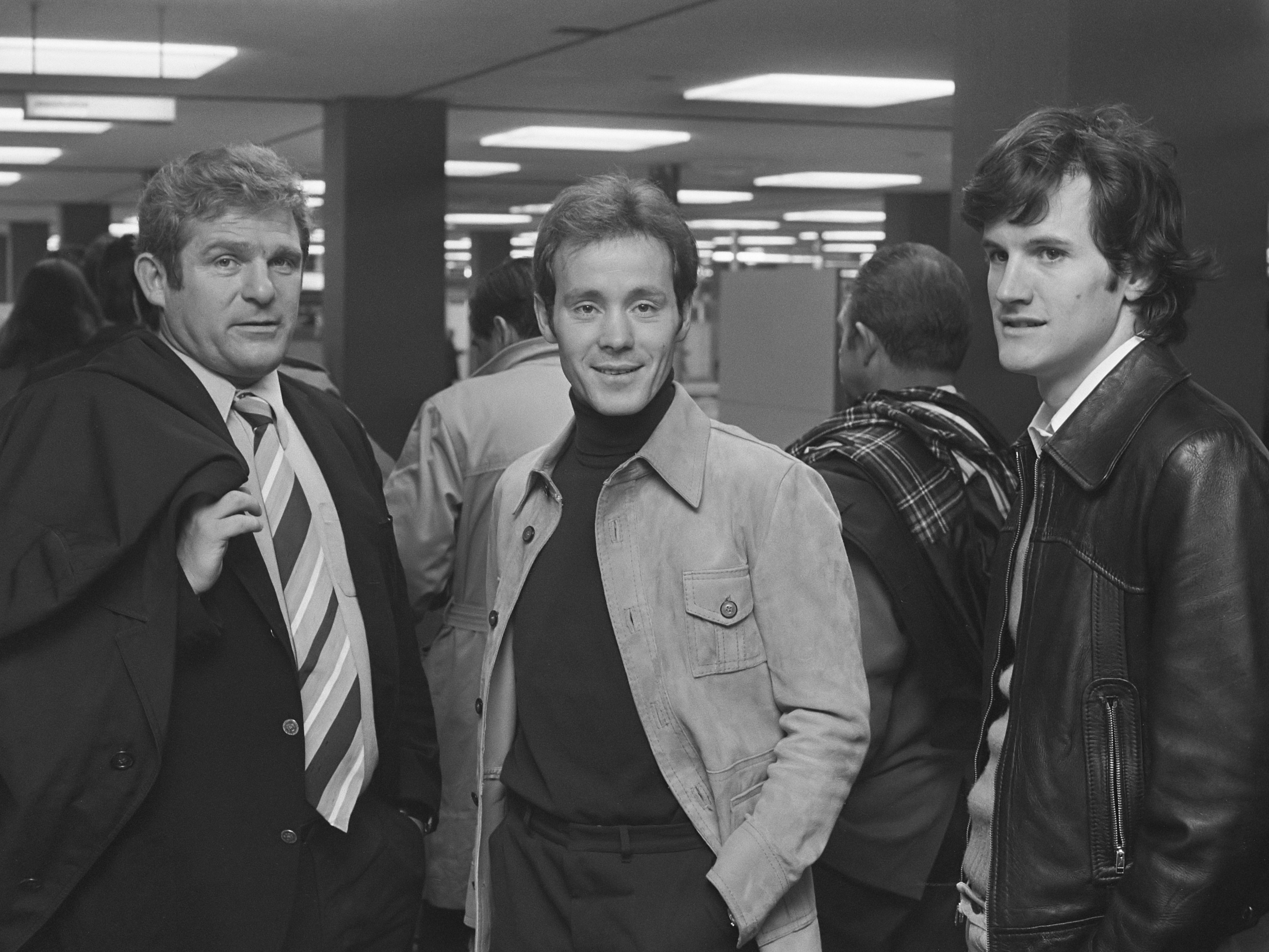 Zwitsers elftal op Schiphol voor wedstrijd tegen Nederlan woensdag aanstaande; v.l.n.r. na aankomst Hussy (trainer) Kuhn (aanvoerder) en Jeandupeux 8 oktober 1974